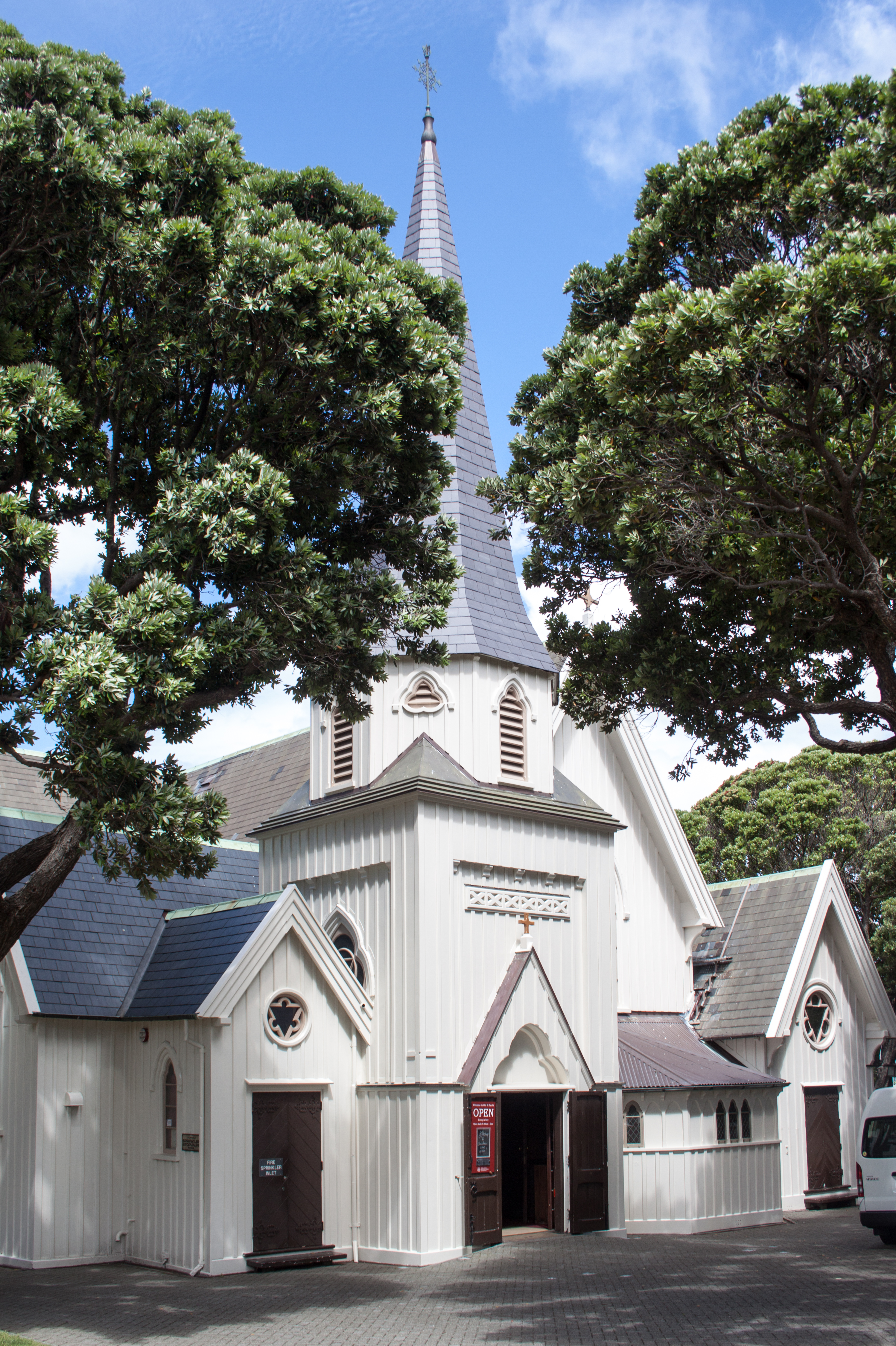 Wellington, Old St Paul's churchlabel QS:Len,"Wellington, Old St Paul's church"